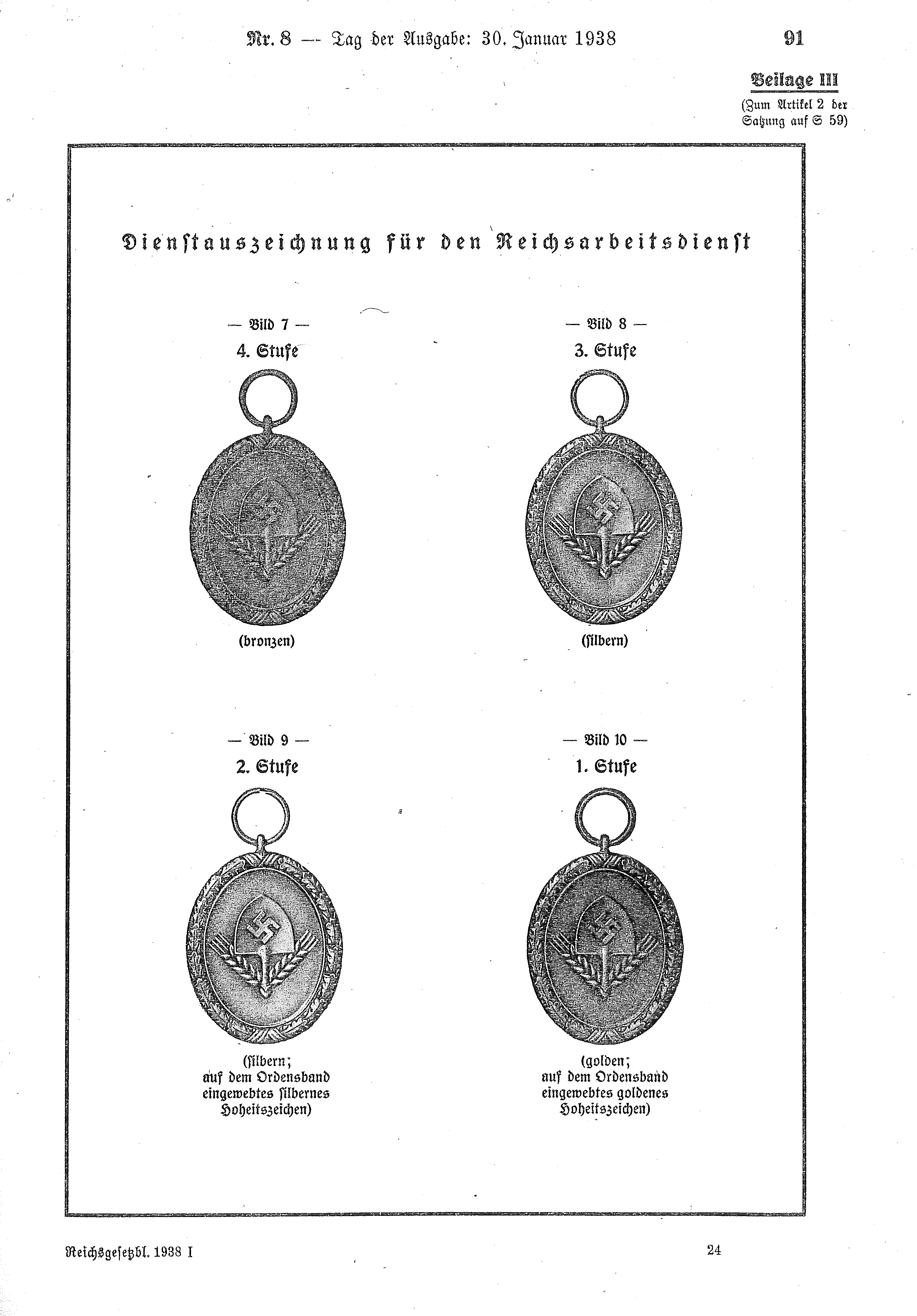 Anlagemuster der Dienstauszeichnung des Reichsarbeitsdienstes